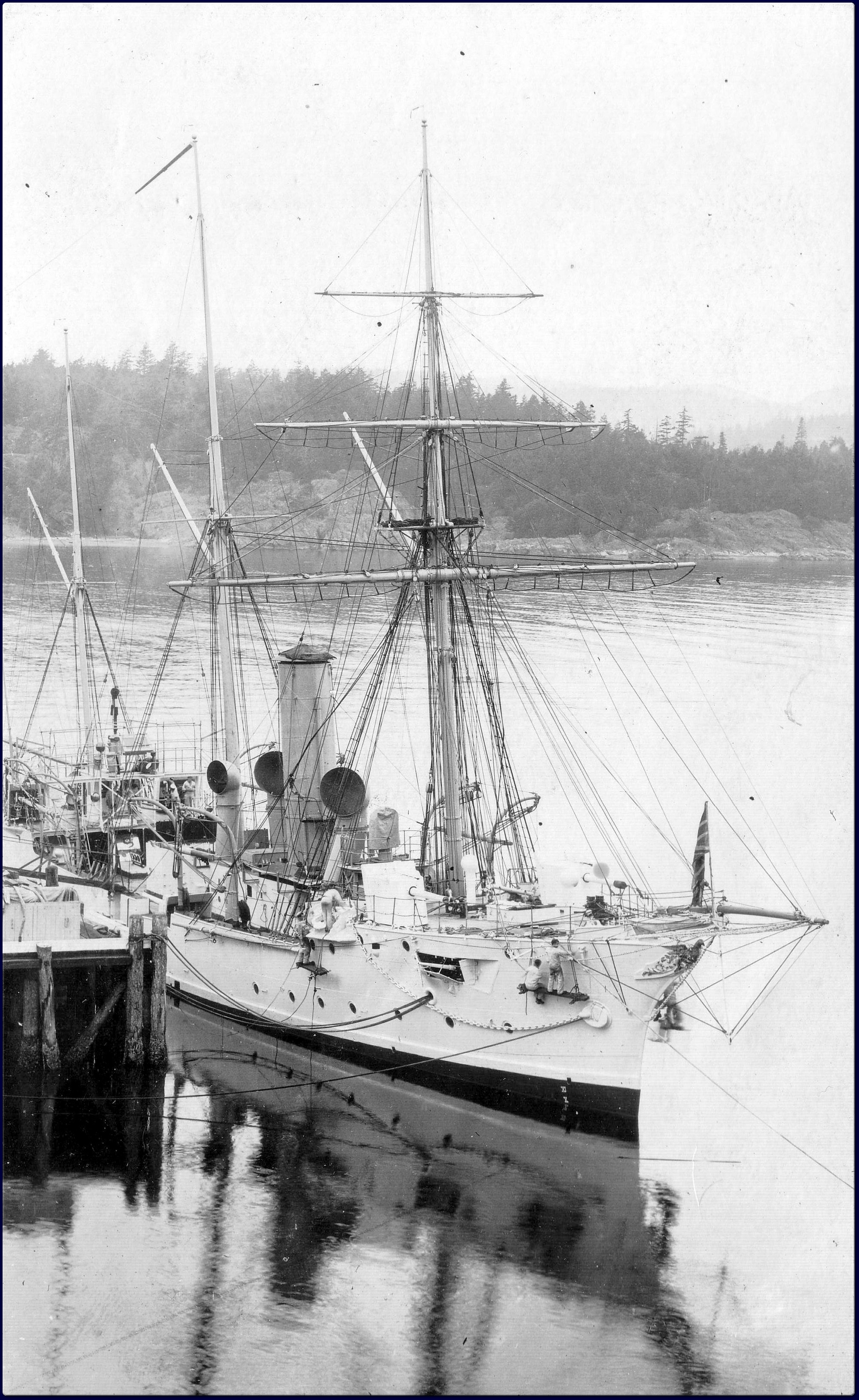 Condor class sloop HMS SHEARWATER alongside in Esquimalt - circa 1908.